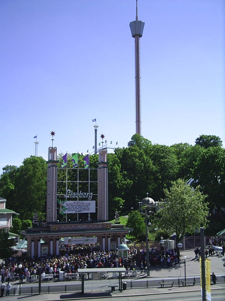 Lisebergs entré. Fotograferad från Svenska mässans 3:e våning av Tubaist.